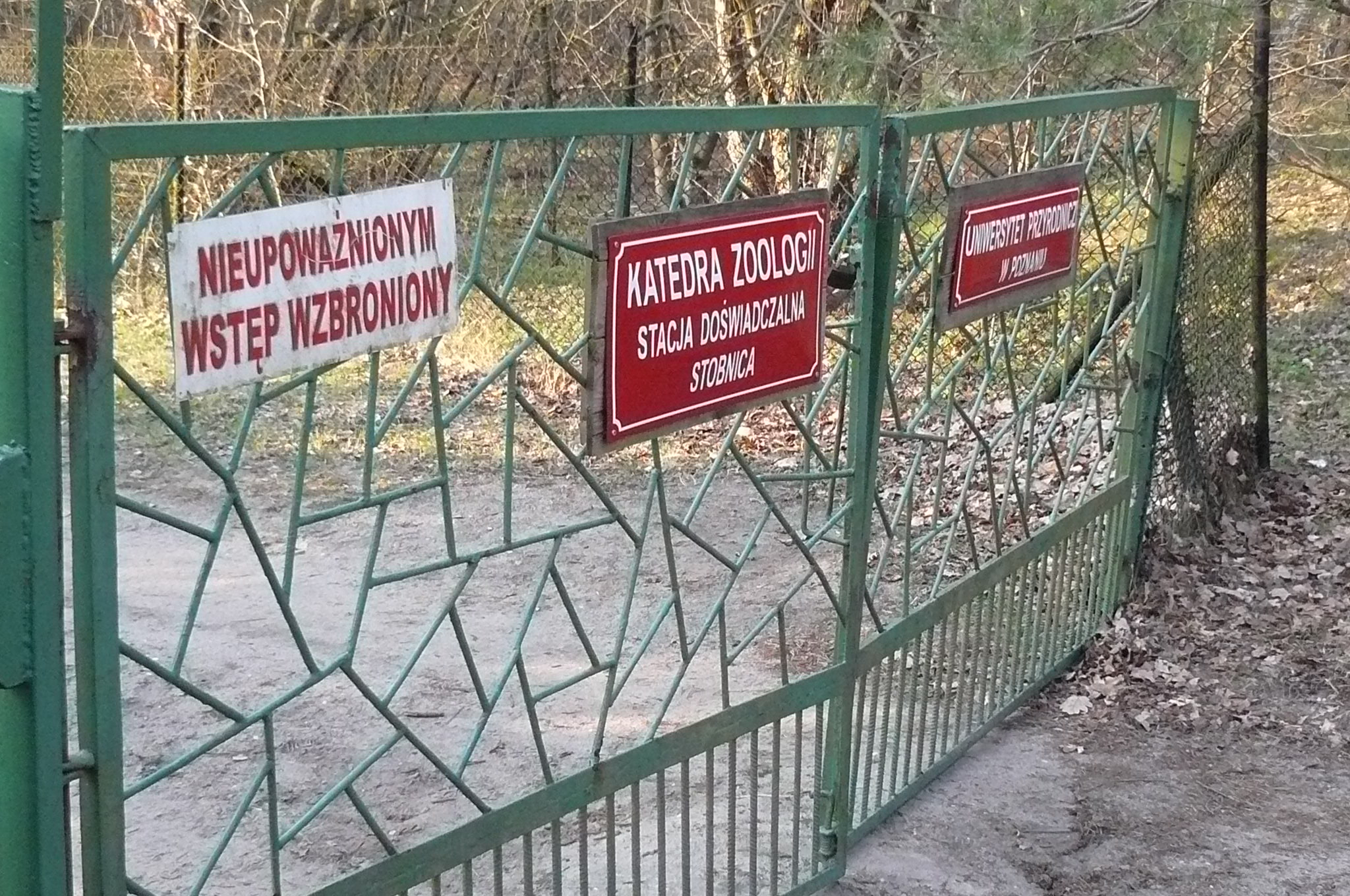 Stacja Doświadczalna Katedry Zoologii Uniwersytetu Przyrodniczego im. Augusta Cieszkowskiego w Poznaniu - Stobnica (Papiernia).